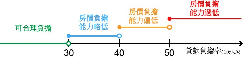 貸款負擔率定義 數線圖